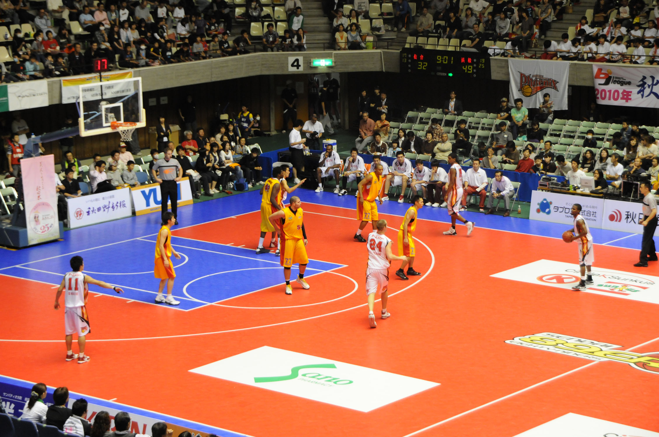 bjリーグ、プレシーズンマッチ